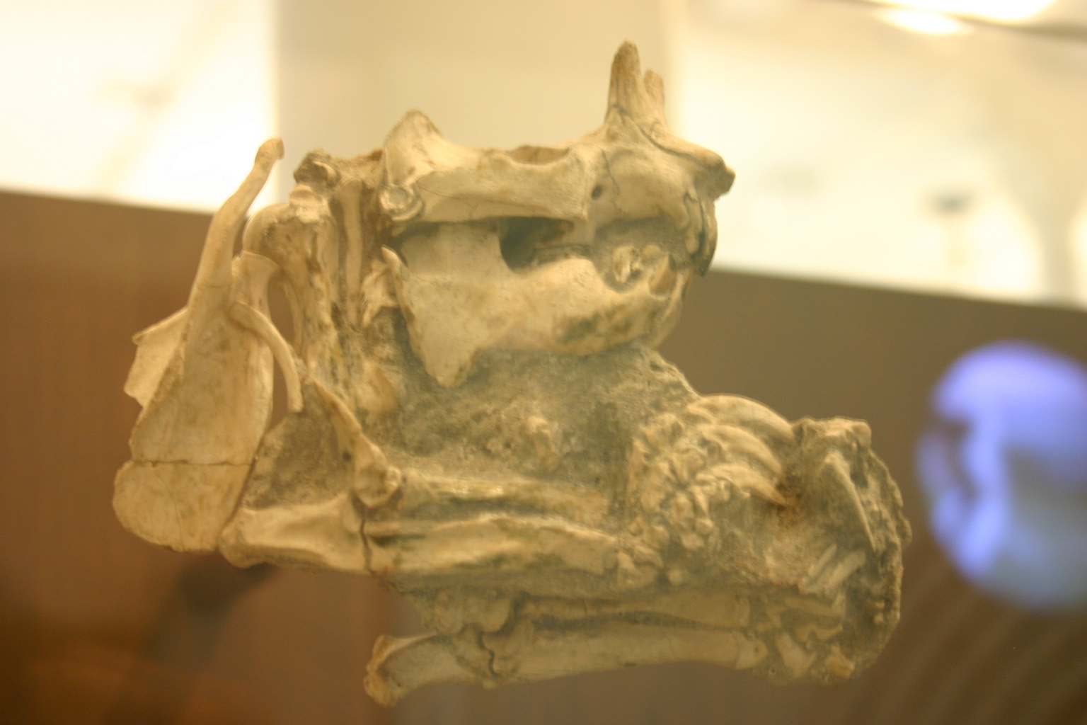 Fossil Ceratogaulus rhinocerus